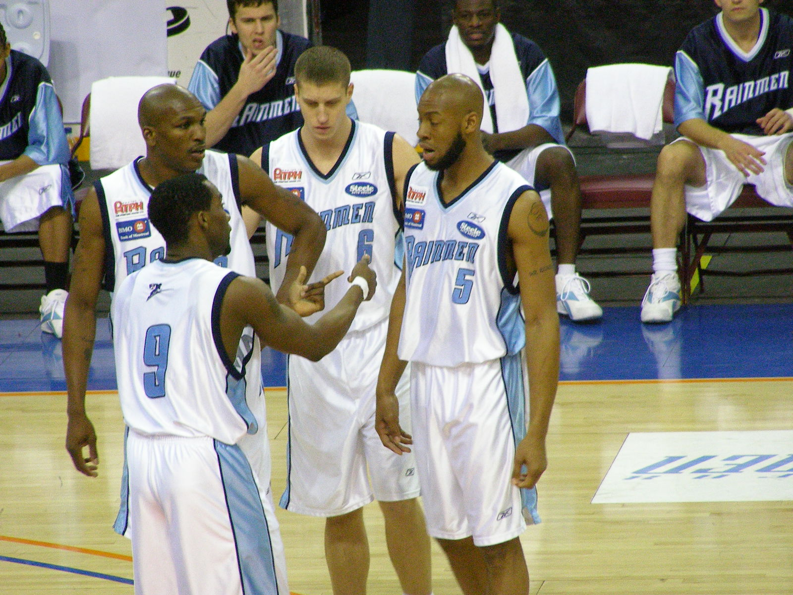 Quebec Kebekwa at Halifax Rainmen (Feb 13 2008)